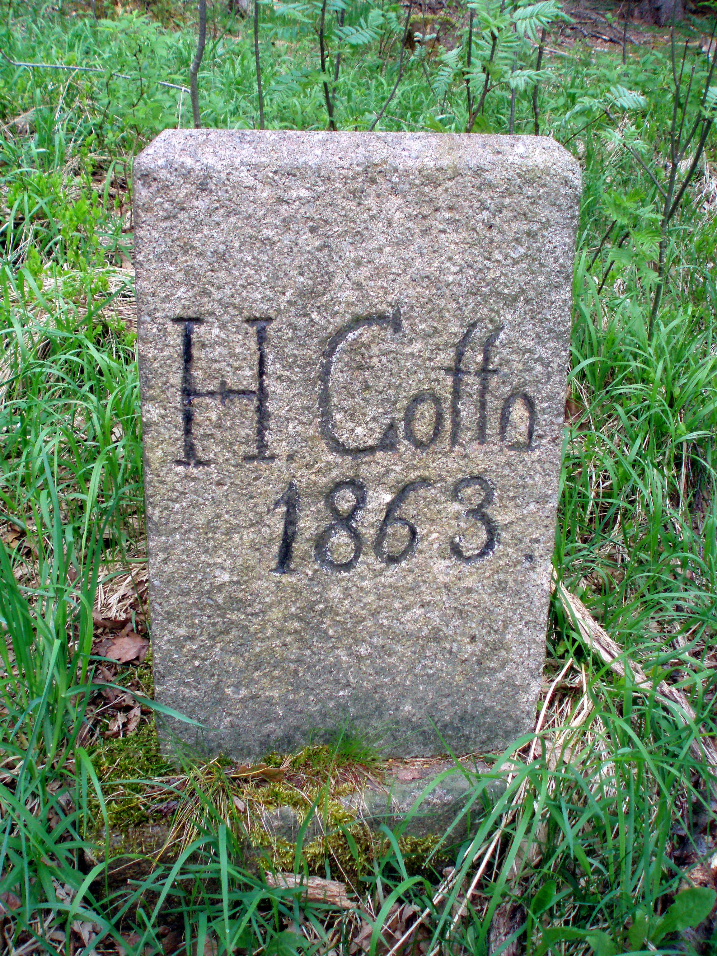 Heinrich-Cotta-Stein von 1863